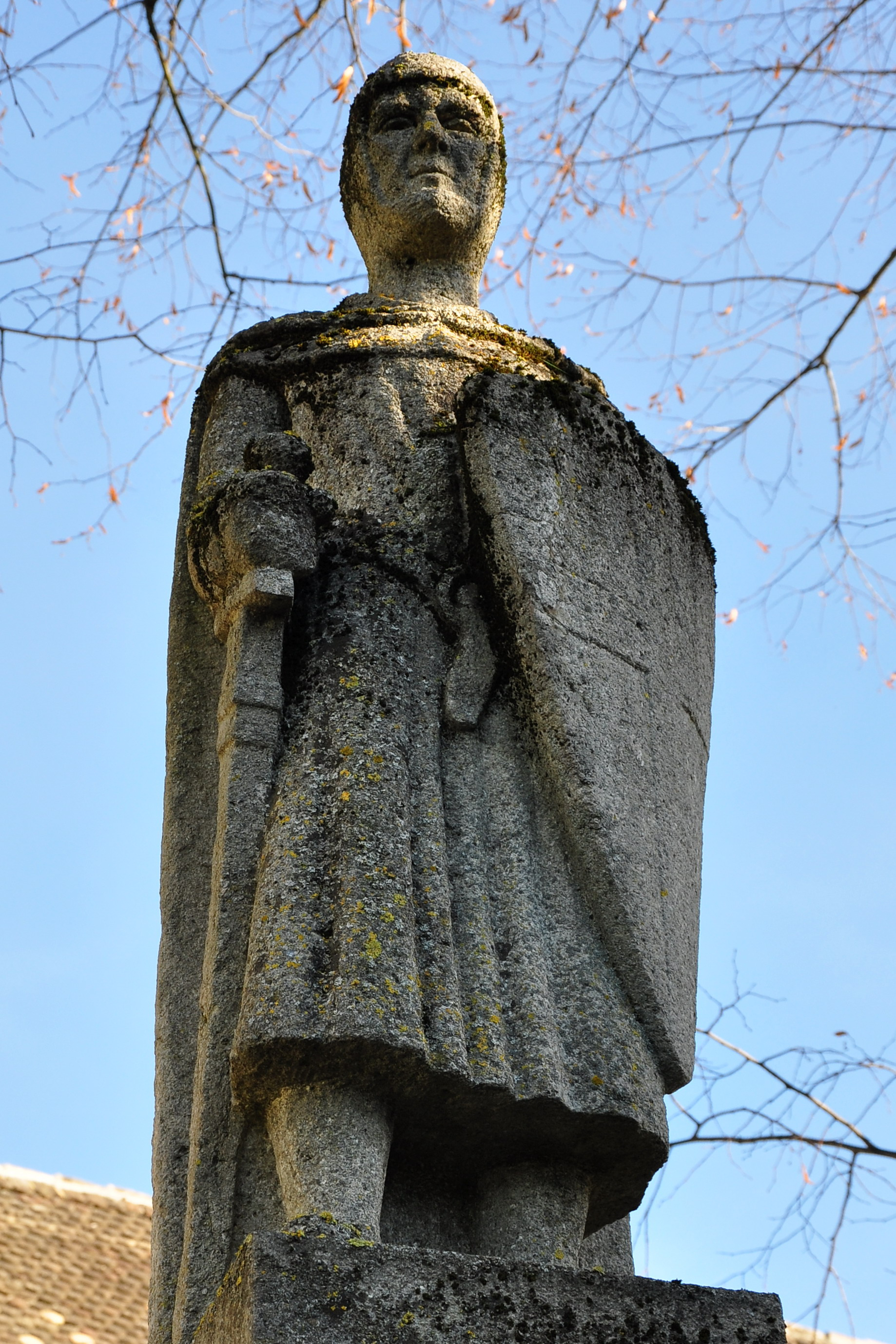 Ritterhaus in Bubikon (Switzerland)